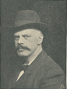 Carl Ewald